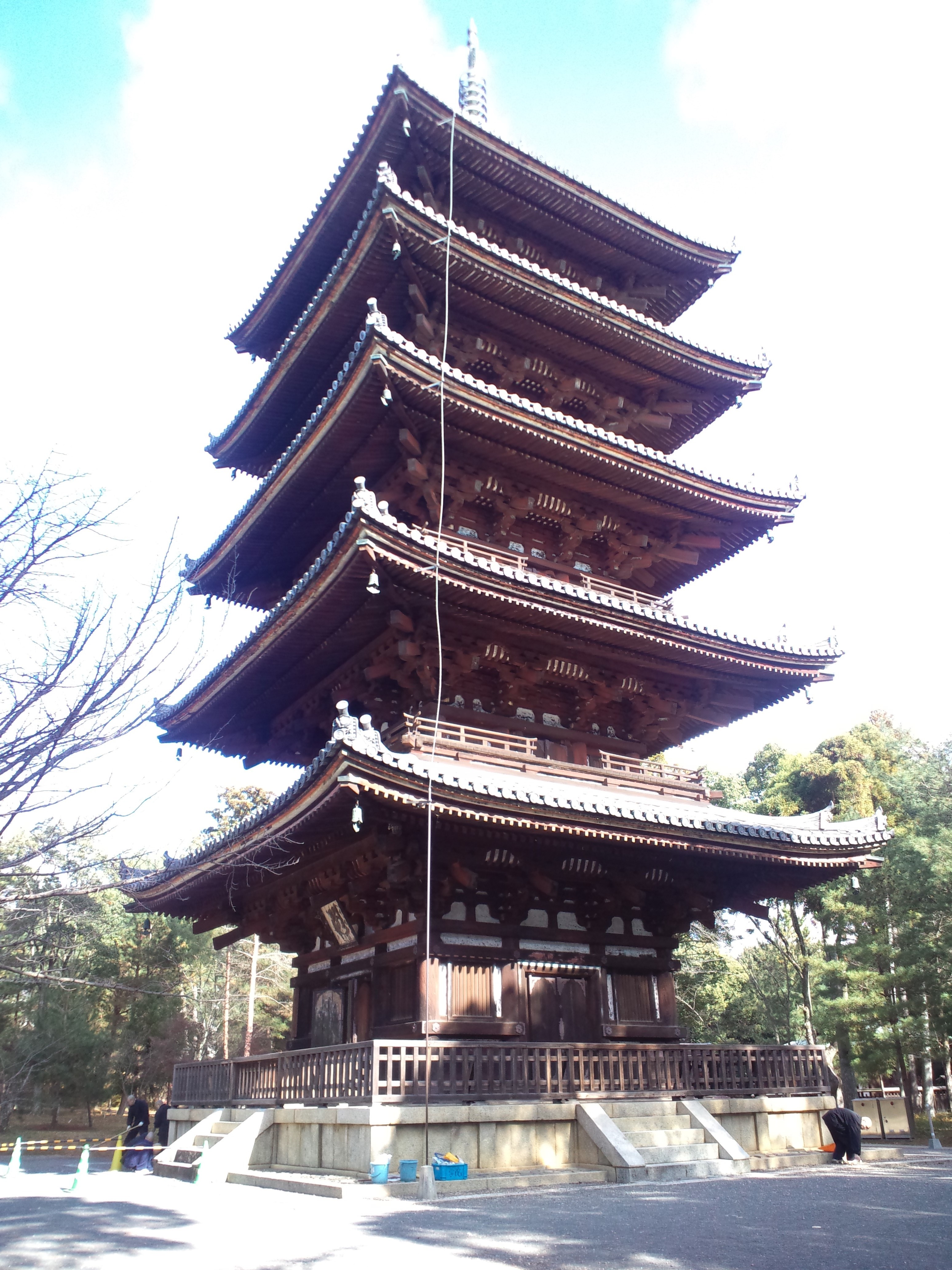 仁和寺 五重塔